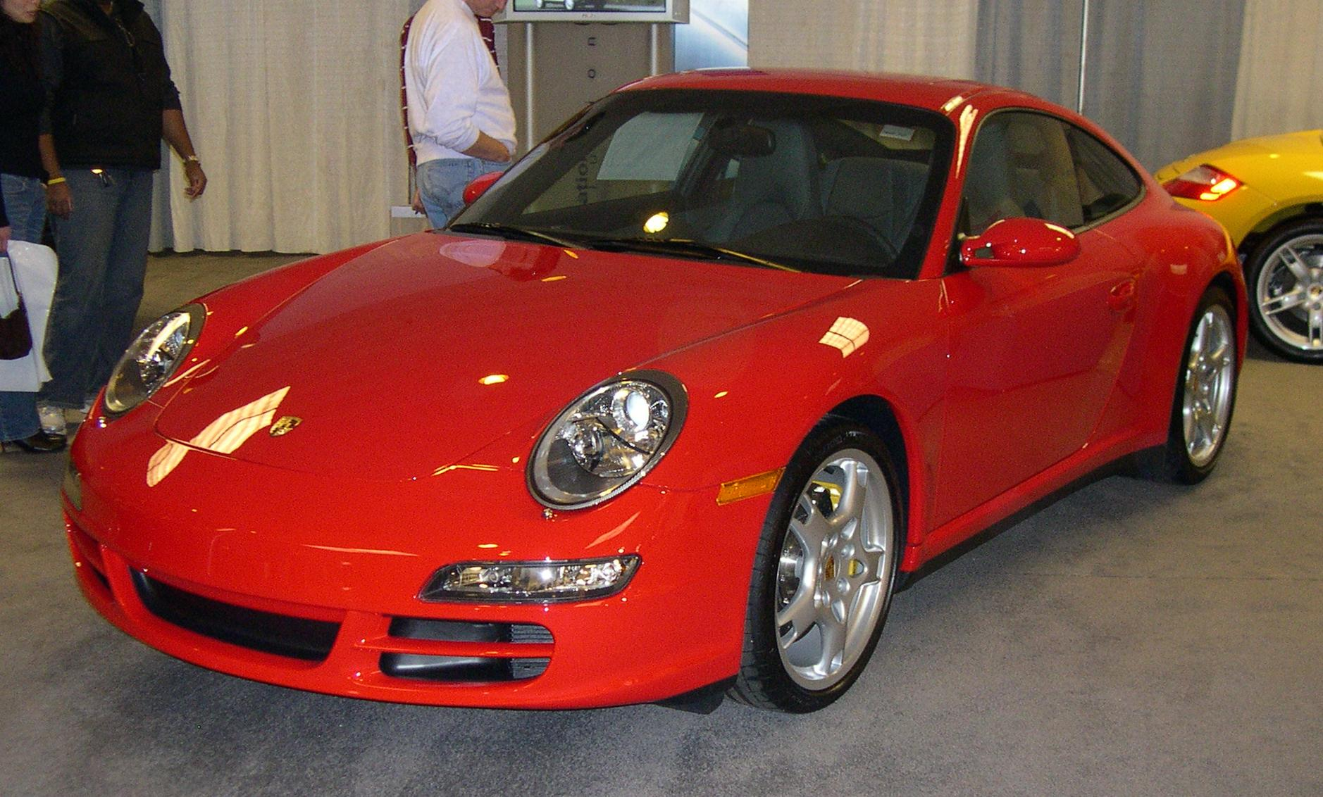 2006 Porsche 997 Carrera 4S